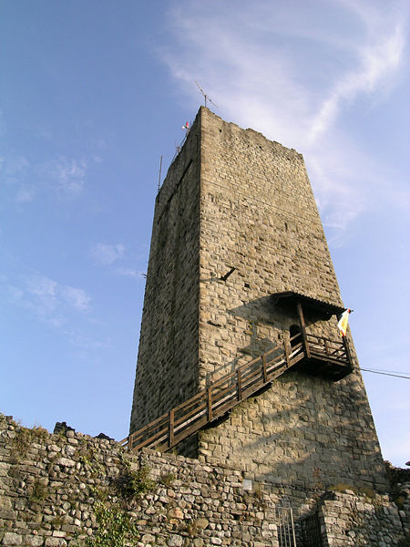 Vue de la tour du Château de Baradello